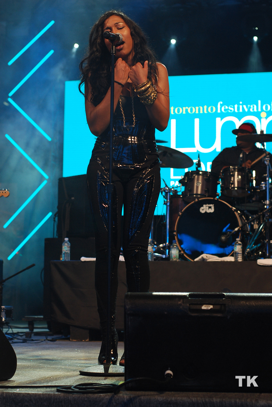 Melanie Fiona.